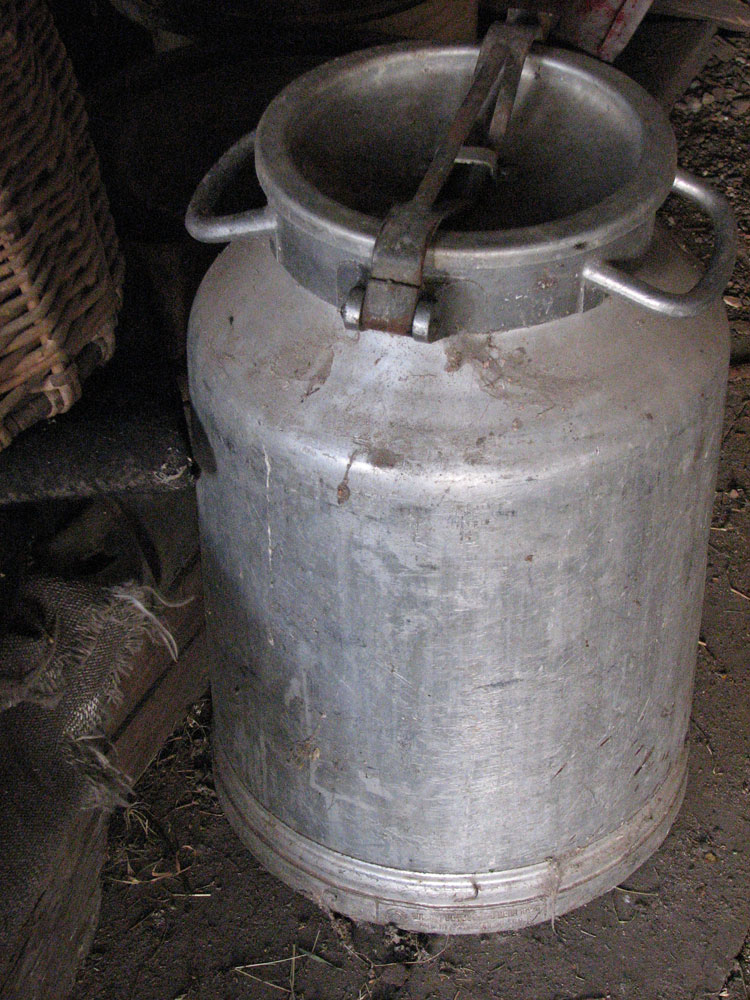 Бидон